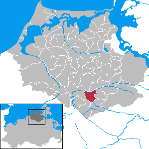 Gransebieth in Mecklenburg-Vorpommern - District Nordvorpommern